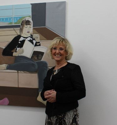 Eva Janina Wieczorek 2015